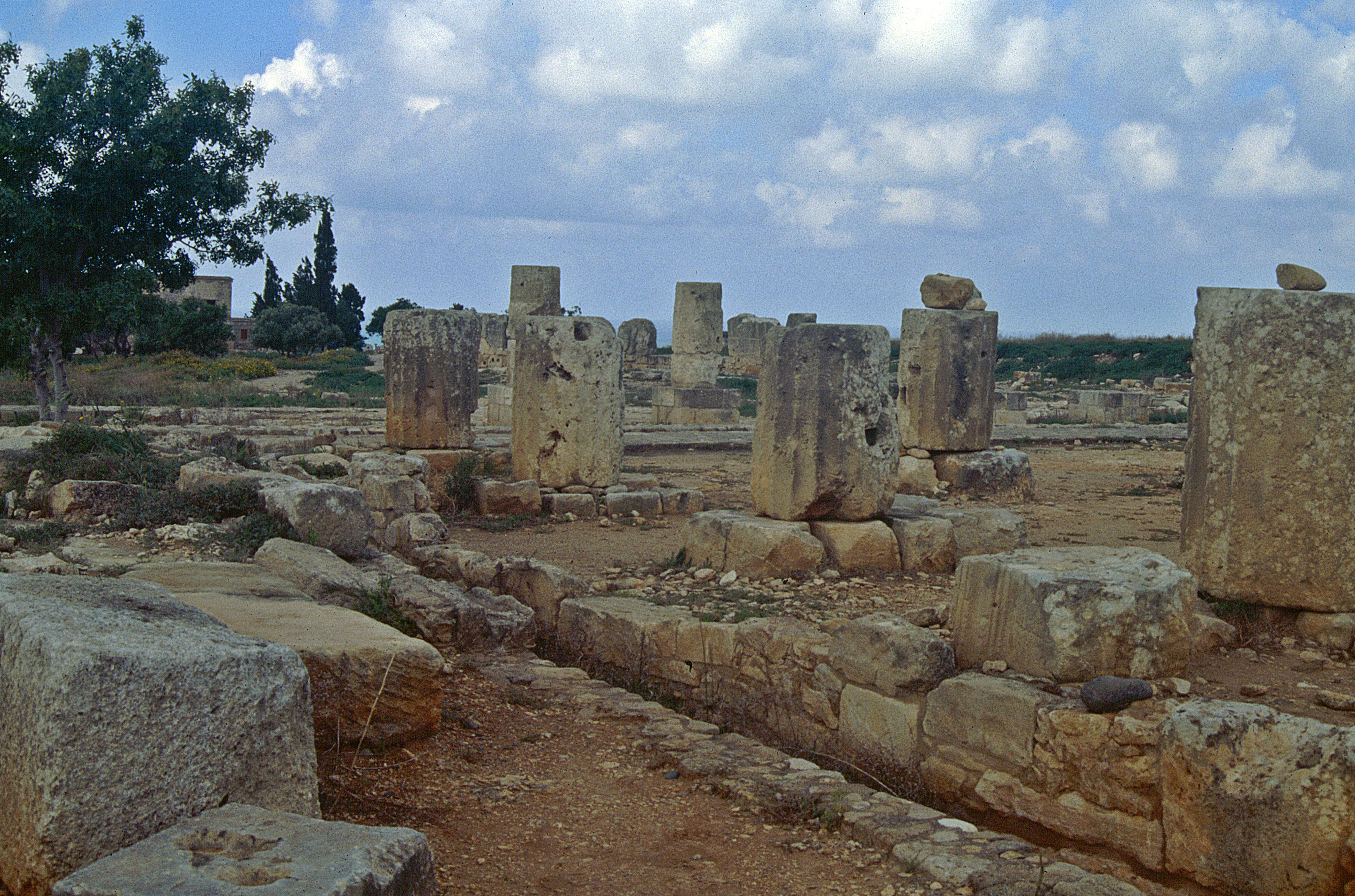 Kouklia: Aphrodite-Heiligtum